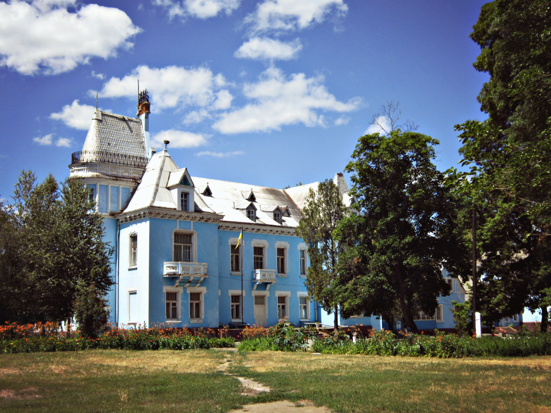 Палац Куріса, с. Ісаєве, Набережна вул., 15